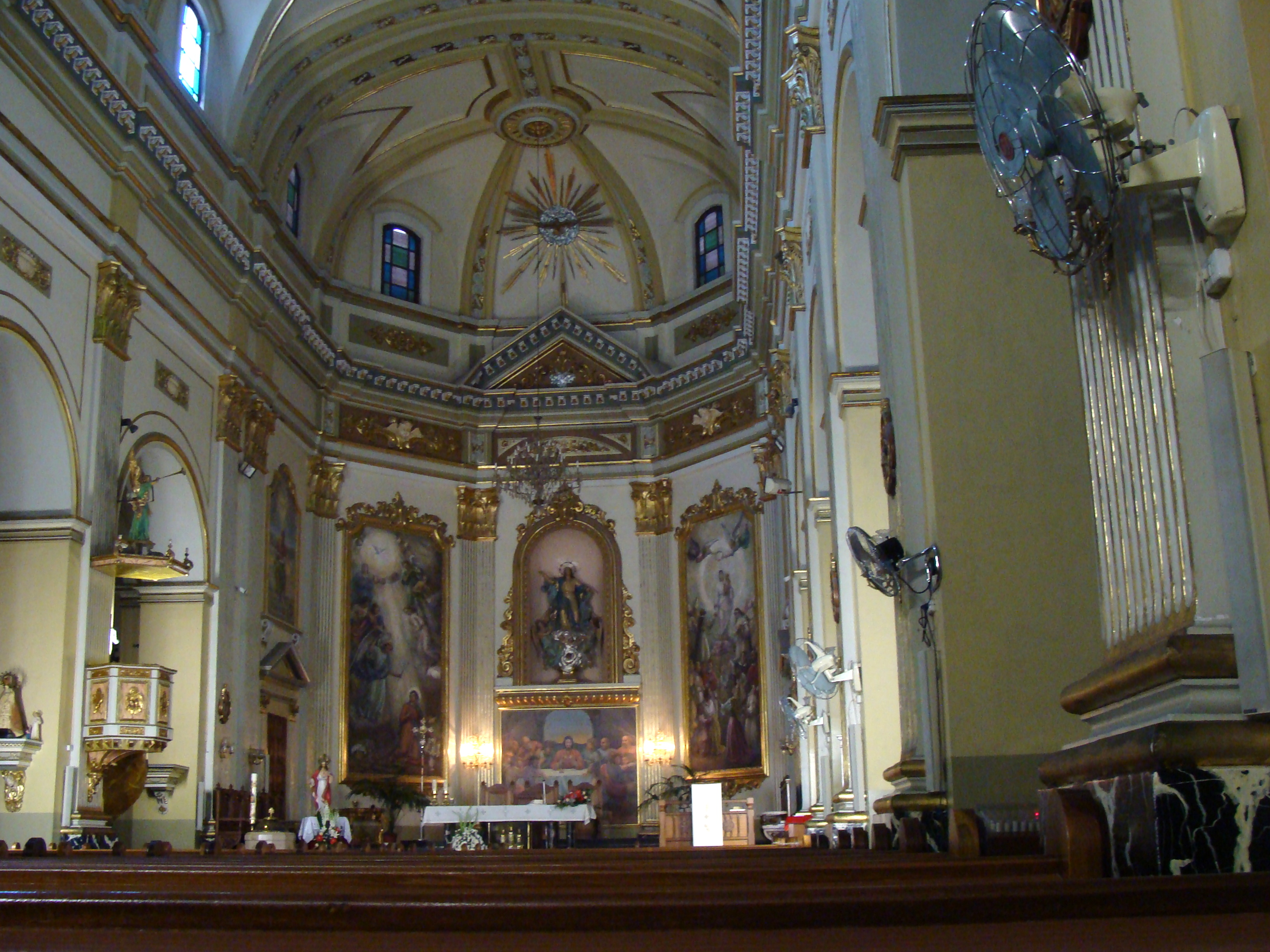 Iglesia de la Asunción de Nuestra Señora (Carlet). Interior